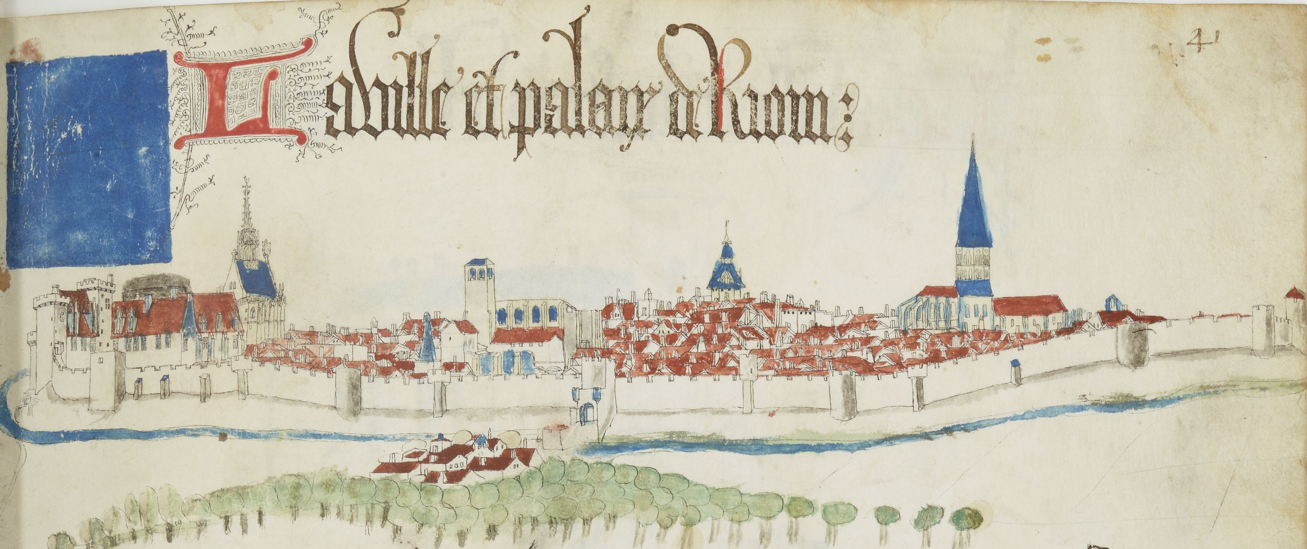 La ville de Riom dessinée vers 1450 par Guillaume Revel pour son Armorial d'Auvergne. Titre du dessin : « La ville et palais de Riom »